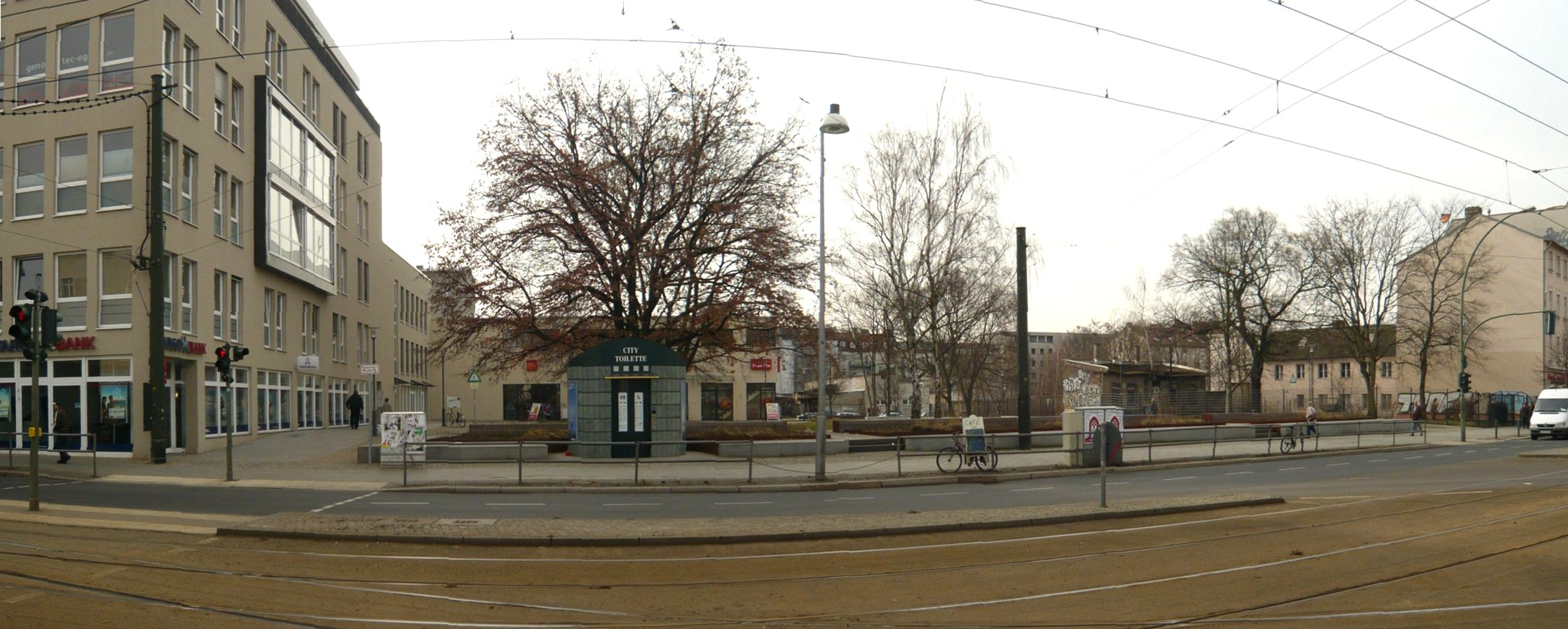 Antonplatz in Berlin-Weßensee